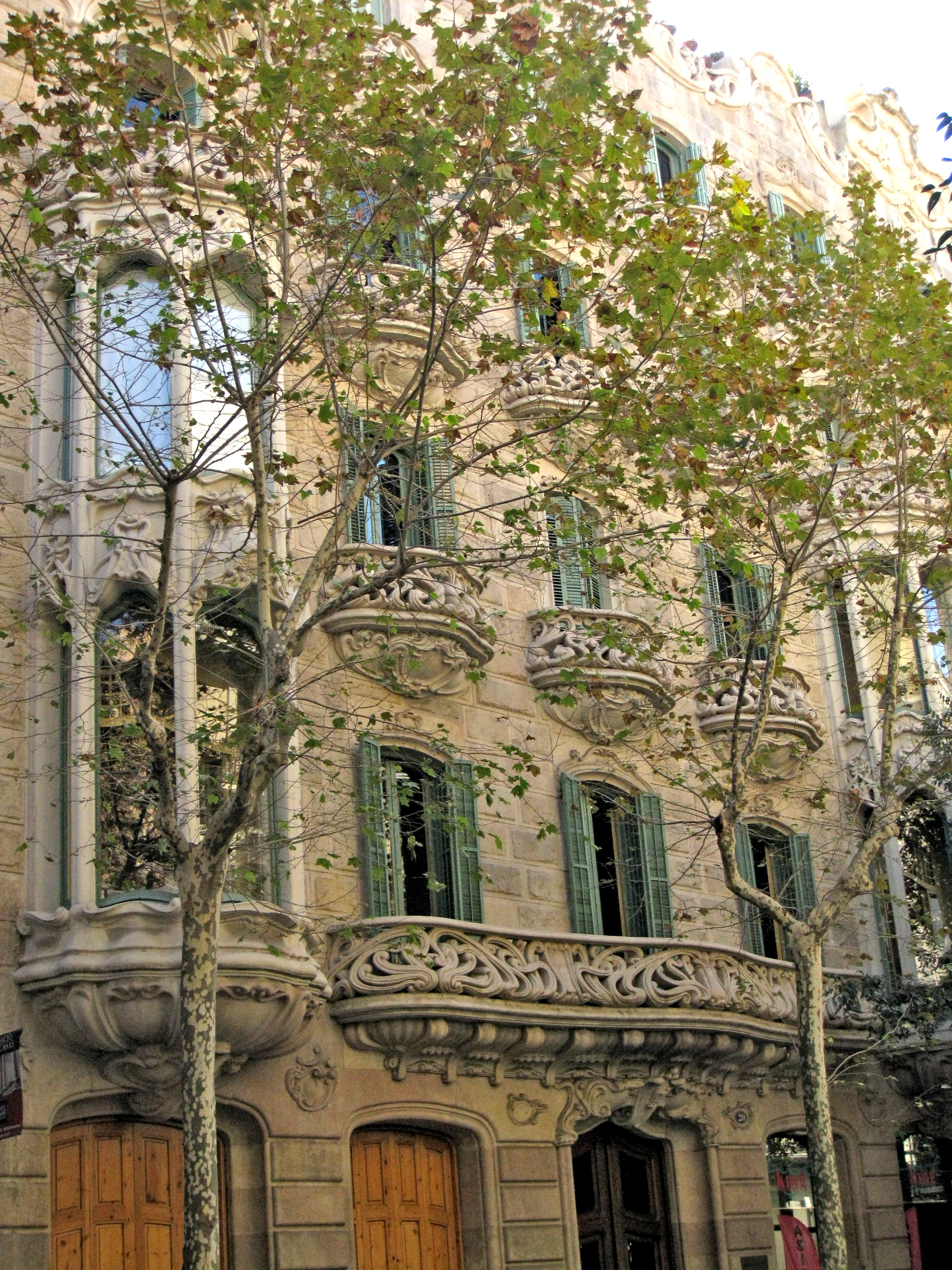 Casa Manuel Felip, al carrer d'Ausiàs Marc núm. 20, a l'Eixample de Barcelona. Edifici modernista, obra de Telmo Fernández i Janot (1901).